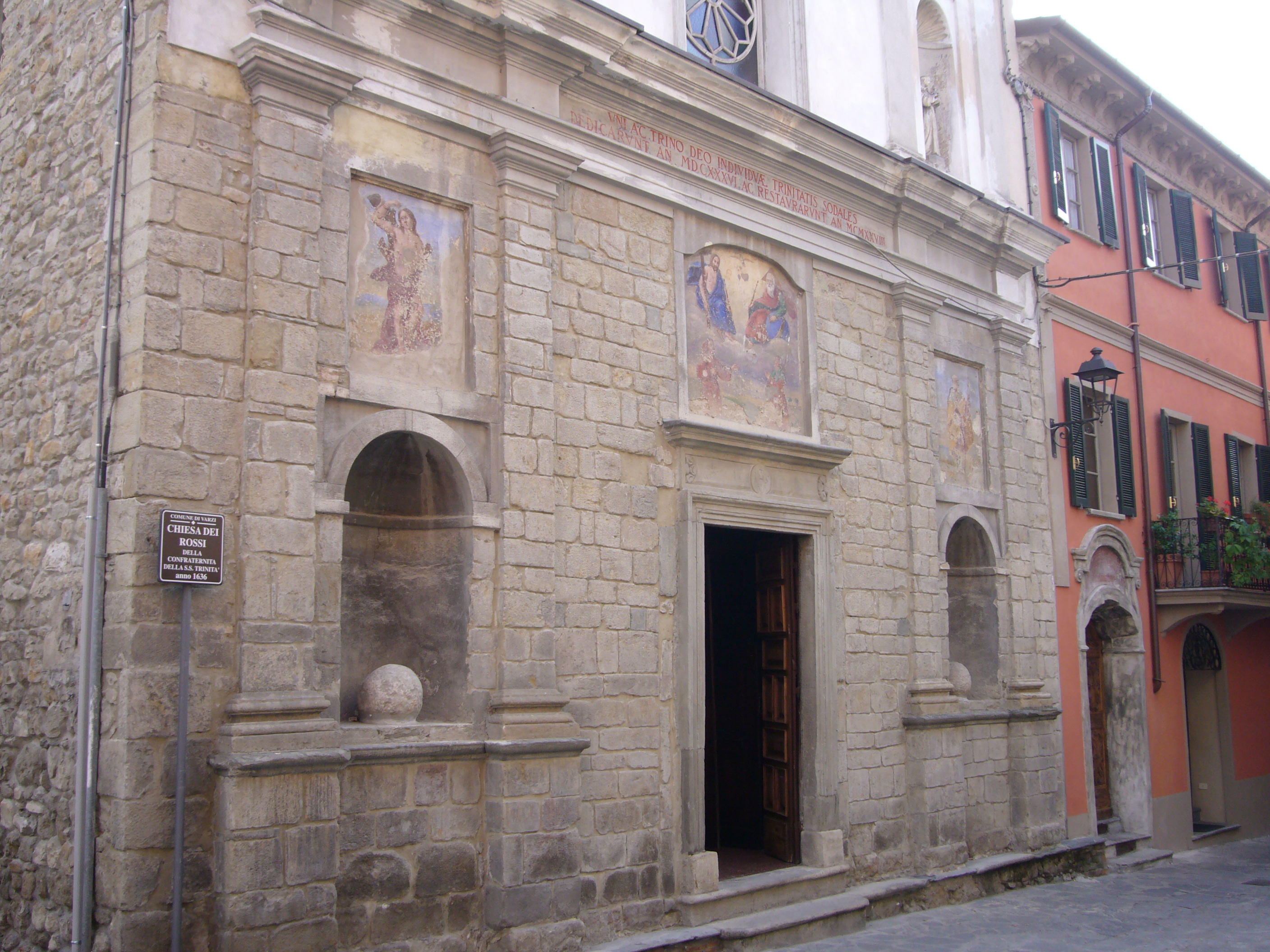 Chiesa dei Rossi, Varzi, Pavia, Lombardia, Italia